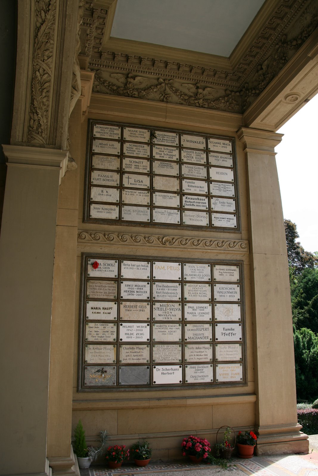 Urnennischen im Heidelberg Krematorium